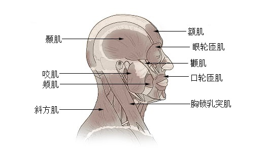 描述：